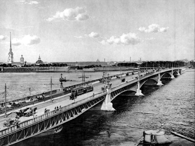 Троицкий мост через Неву в Санкт-Петербурге в начале XX века